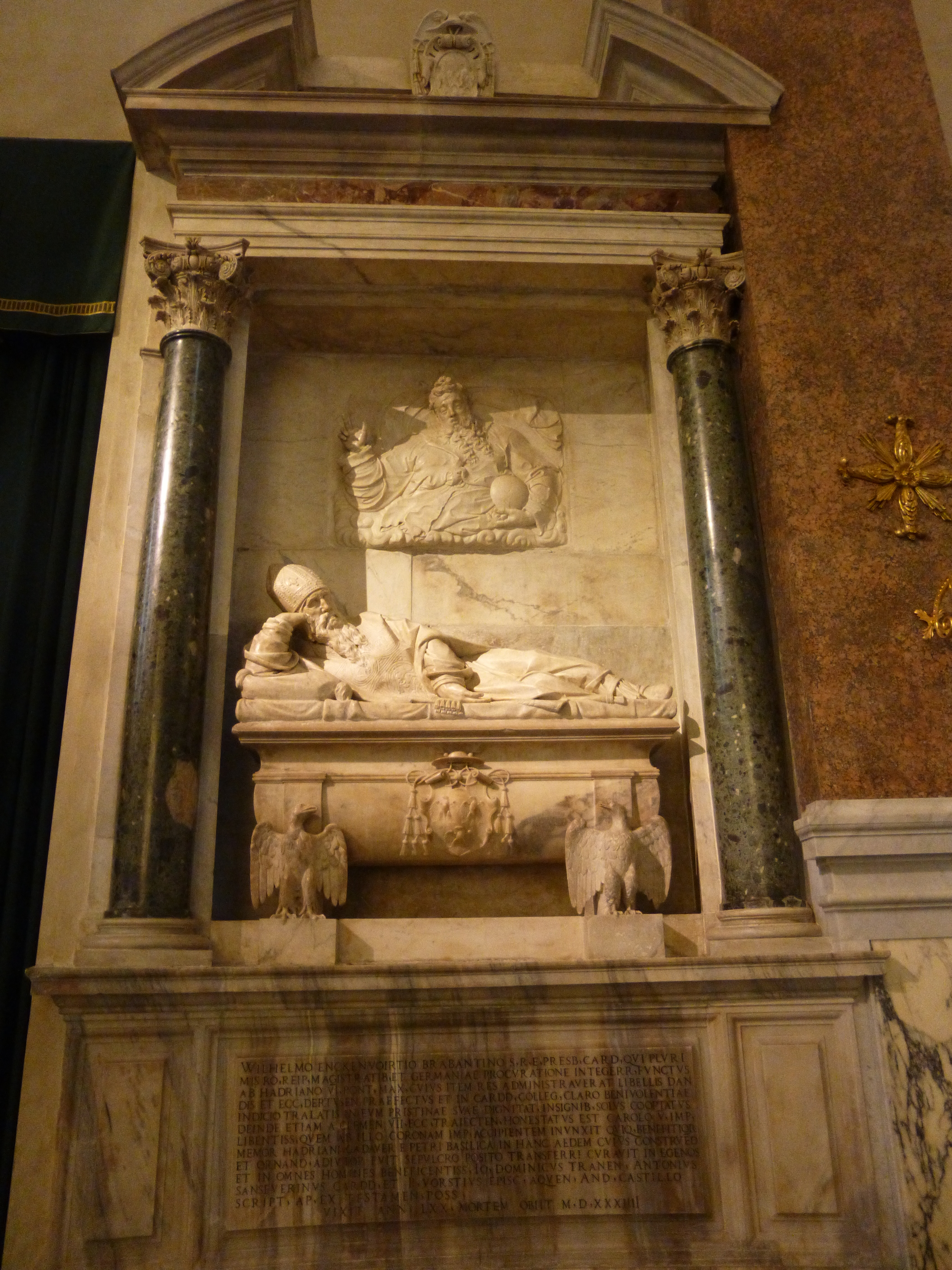 Roma, S. Maria dell'Anima, controfacciata. Tomba del cardinale Willem van Enckevoirt